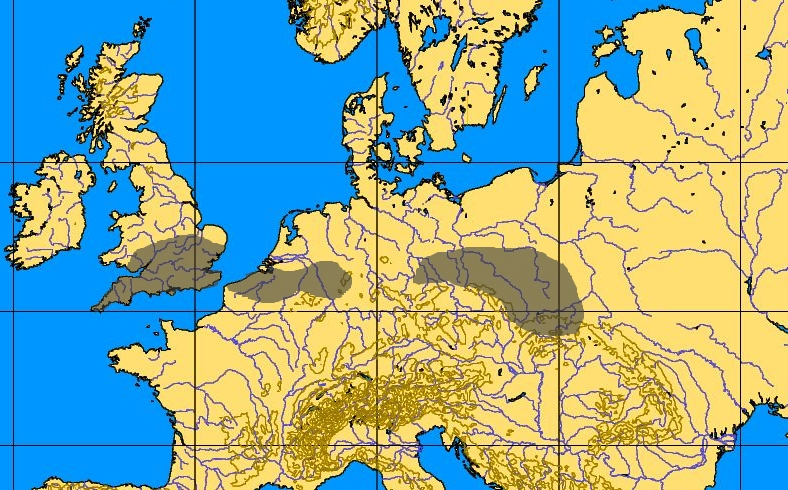 Kompleks kulturowy Lincombian-Ranisian-Jerzmanowician